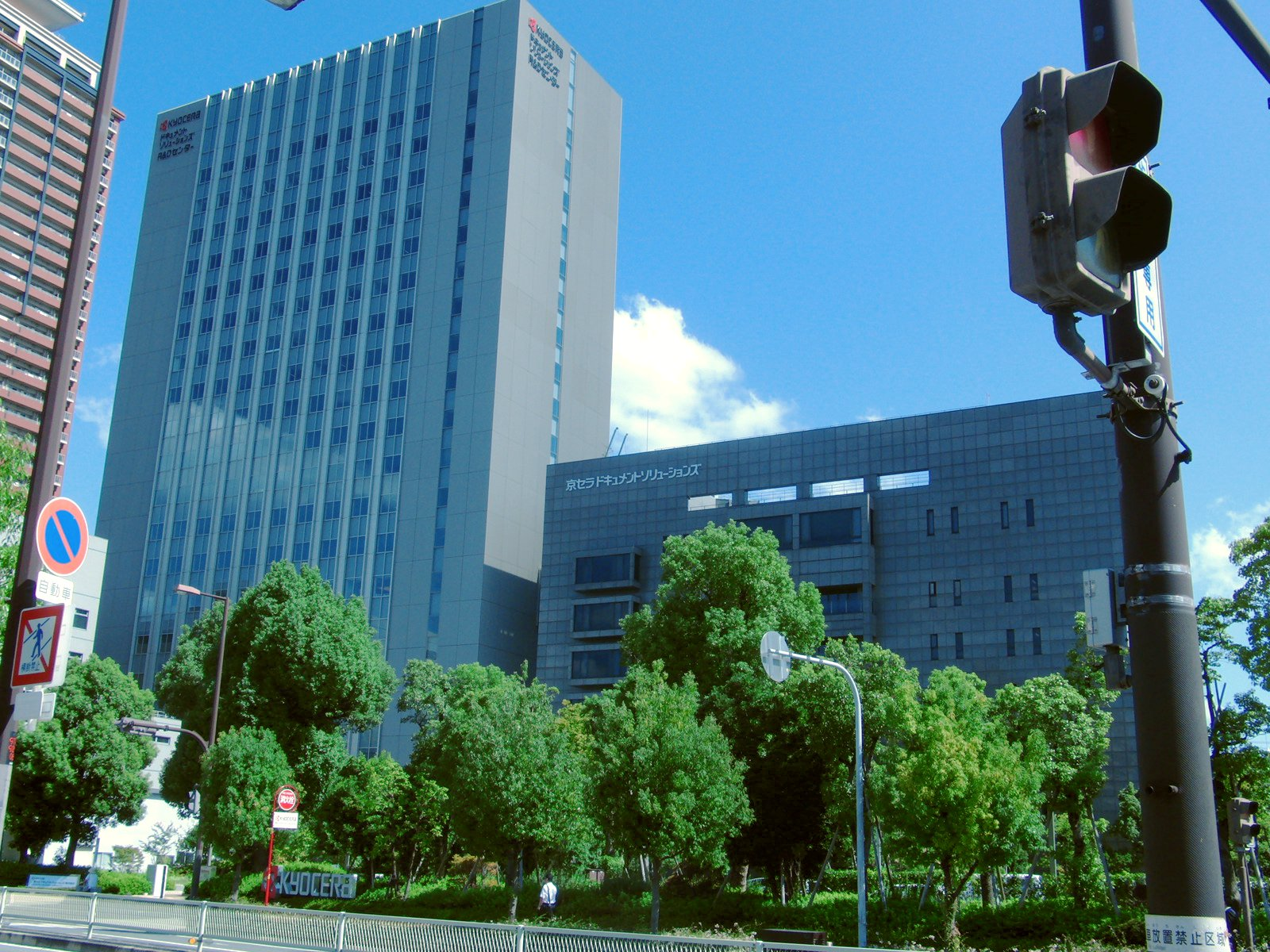 京セラドキュメントソリューションズ本社を撮影